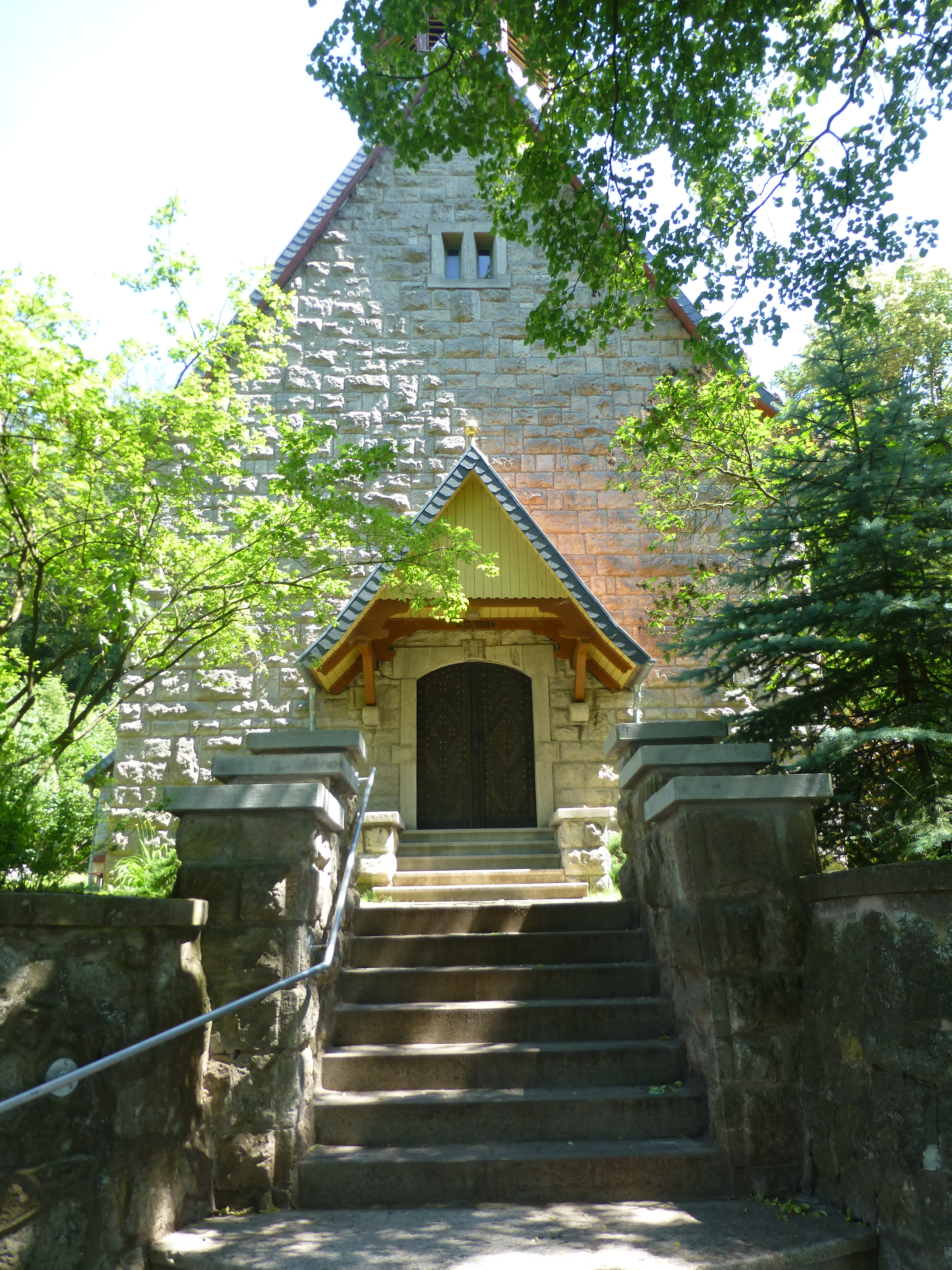 Portal der evangelischen Kirche in Bernterode/Schacht